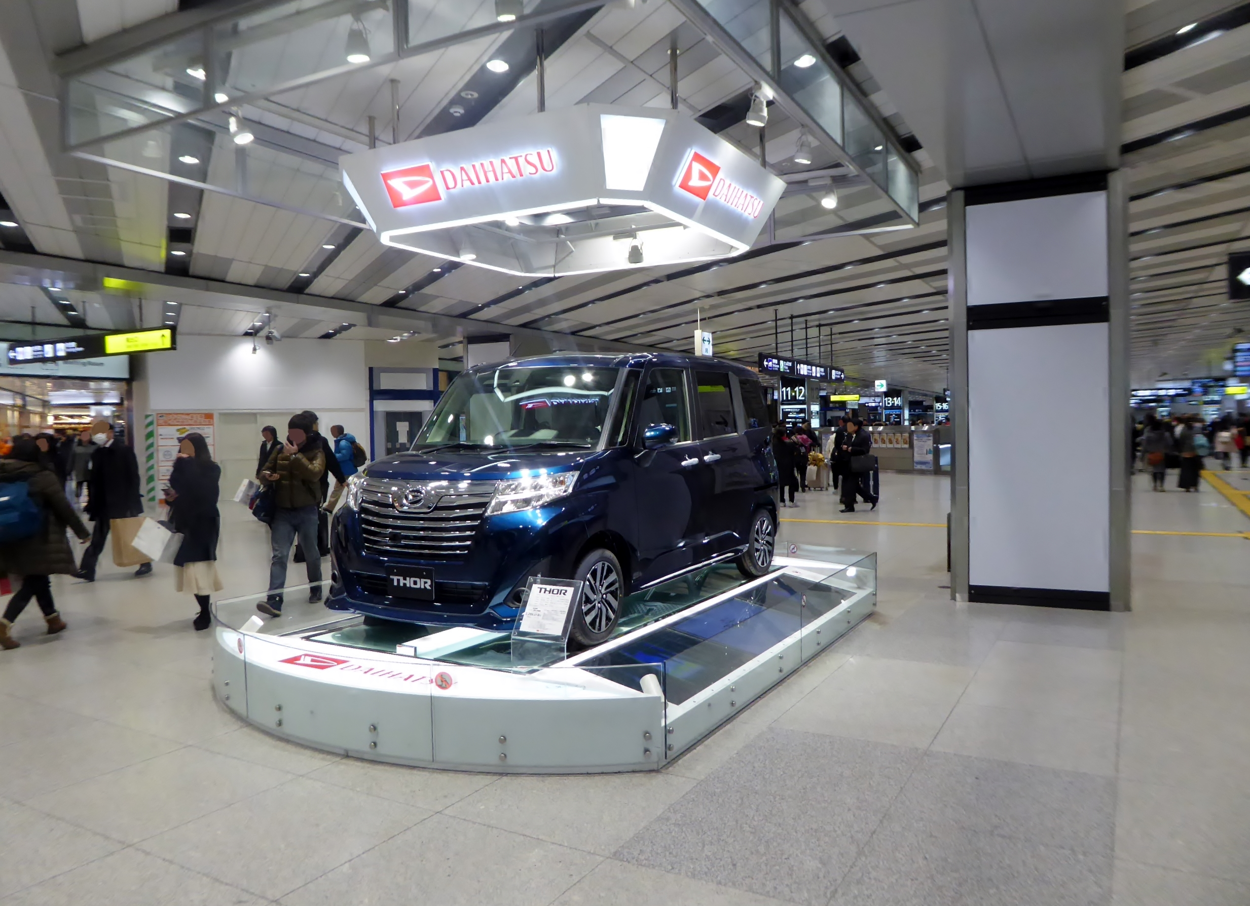 JR新大阪駅在来線コンコース内にあるダイハツ車展示スペースを撮影。